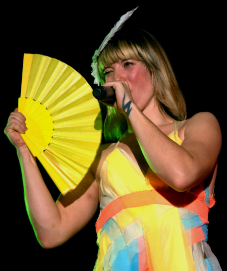 Sängerin Mieze Katz der Berliner Band MIA.